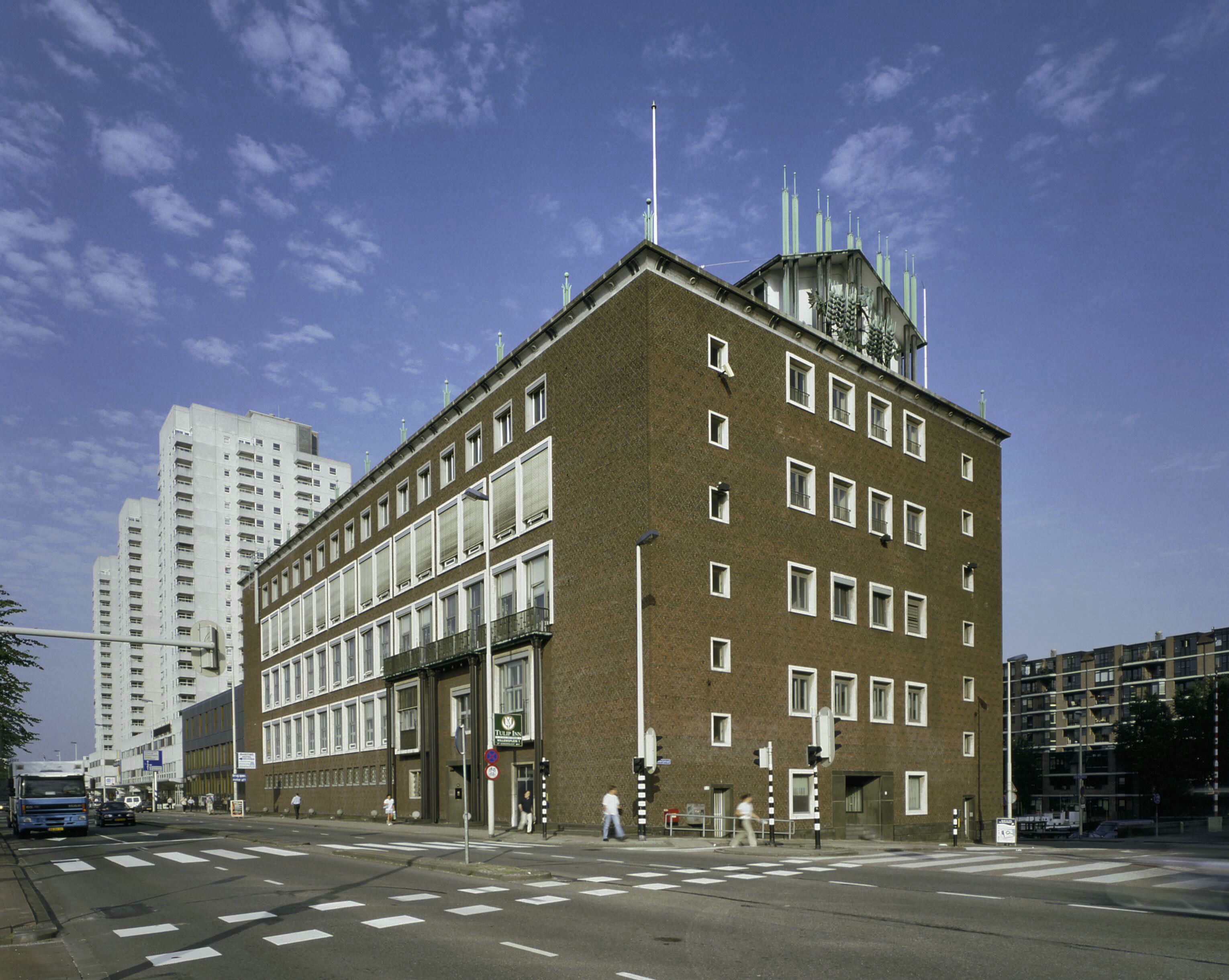 Bijbank Nederlandsche Bank: Overzicht van de voorgevel met de ingangspartij en de rechter zijgevel (opmerking: Gefotografeerd voor Monumenten van Herrezen Nederland)